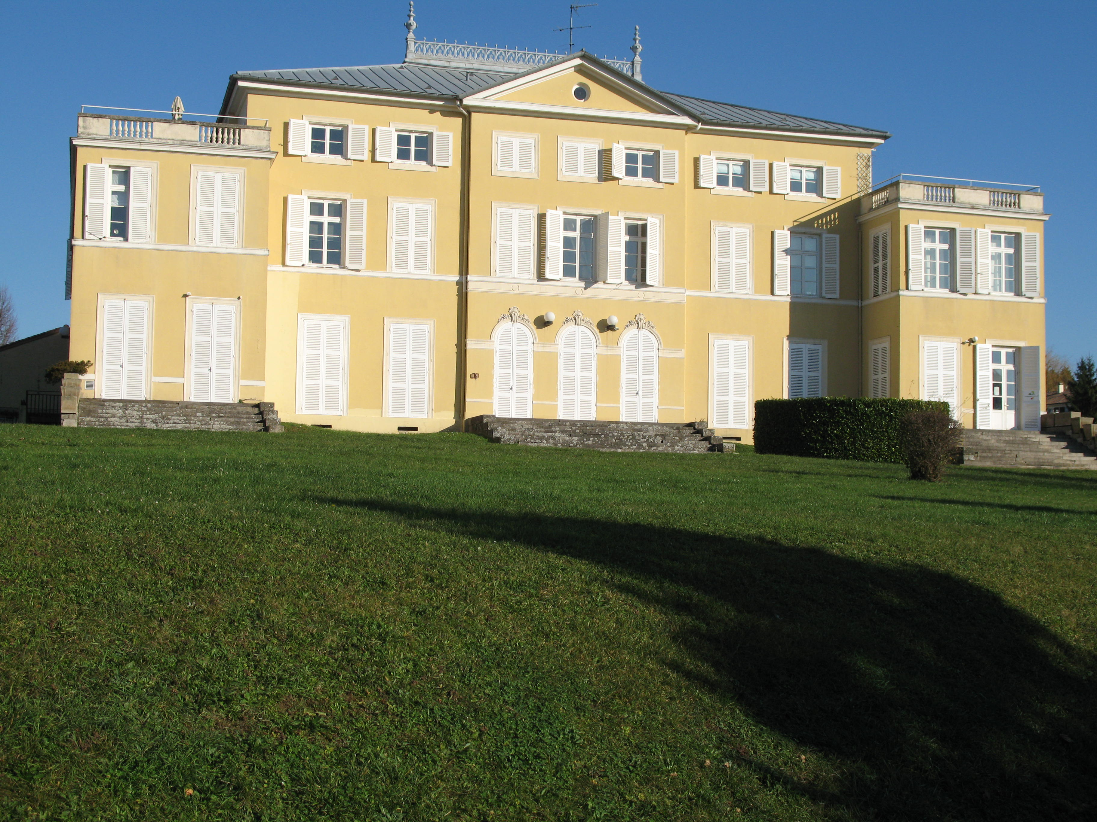 Le château de Bois Dieu à Lissieu dans le Rhône